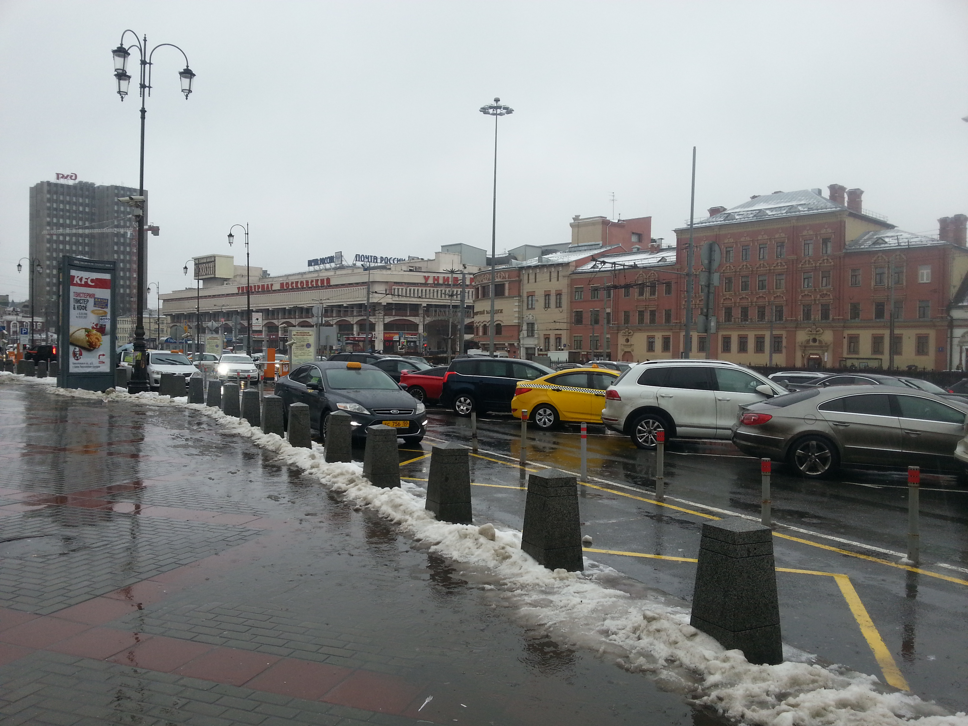 Вид на универмаг "Московский". Комсомольская площадь, 11 ноября 2016г.